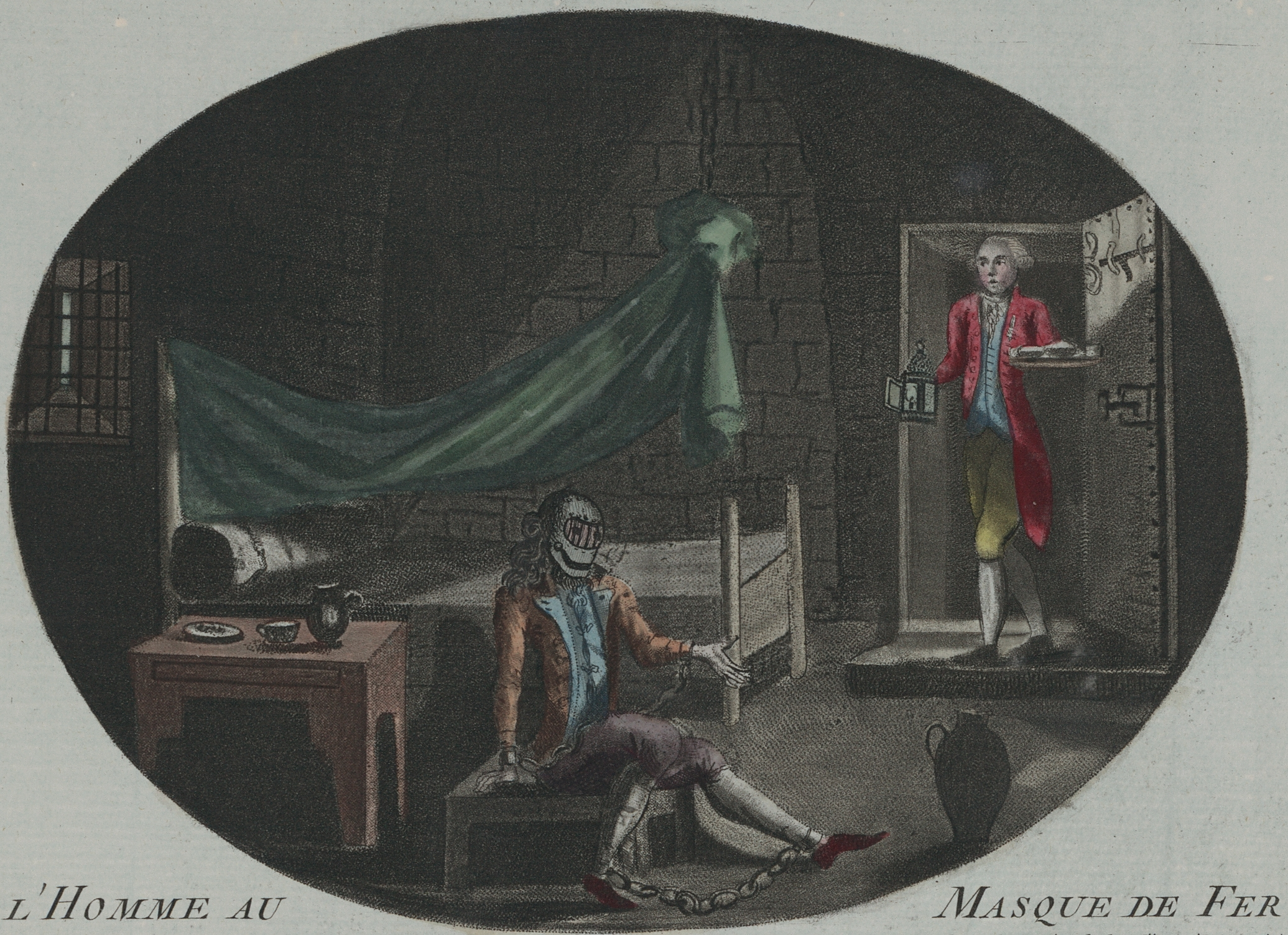 "L'Homme au Masque de Fer" ("The Man in the Iron Mask"). Anonymous print (etching and mezzotint, hand-colored) from 1789. According to the caption on the original (not seen here), the Man in the Iron Mask was Louis de Bourbon, comte de Vermandois, an illegitimate son of Louis XIV. No evidence is given to support this claim, which is just one among many, and may have been merely a piece of revolutionary propaganda. Caption (in French, with modernized spelling): "L'Homme au Masque de Fer, ou plutôt son histoire, qui a si longtemps fixé les recherches d'une infinité d'auteurs, vient de sortir enfin du ténébreux chaos où la discrétion barbare d'intermédiaires ministériels l'avaient plongé jusqu'à présent. Des papiers trouvés à la Bastille nous apprennent que cette dénomination n'a jamais appartenu qu'à Louis de Bourbon, comte de Vermandois, fils naturel de Louis XIV, né le 2 octobre 1667, qui fut condamné à un emprisonnement perpétuel pour avoir, à l'âge de 16 ans, donné un soufflet au Dauphin. Pour envelopper ses traits d'un voile impénétrable, on lui couvrit le visage d'un masque de fer dont la mentonnière et les ressorts d'acier lui permettaient néanmoins de prendre sa subsistance. C'est en 1683 que l'on place l'époque de sa détention. Ce malheureux Prince mourut à la Bastille en 1703 après une captivité de 20 ans dans différentes prisons. (Ceux qui voudront avoir des renseignements plus étendus sur cet objet pourront consulter un papier qui se vend Rue de Chartres N°85.)"